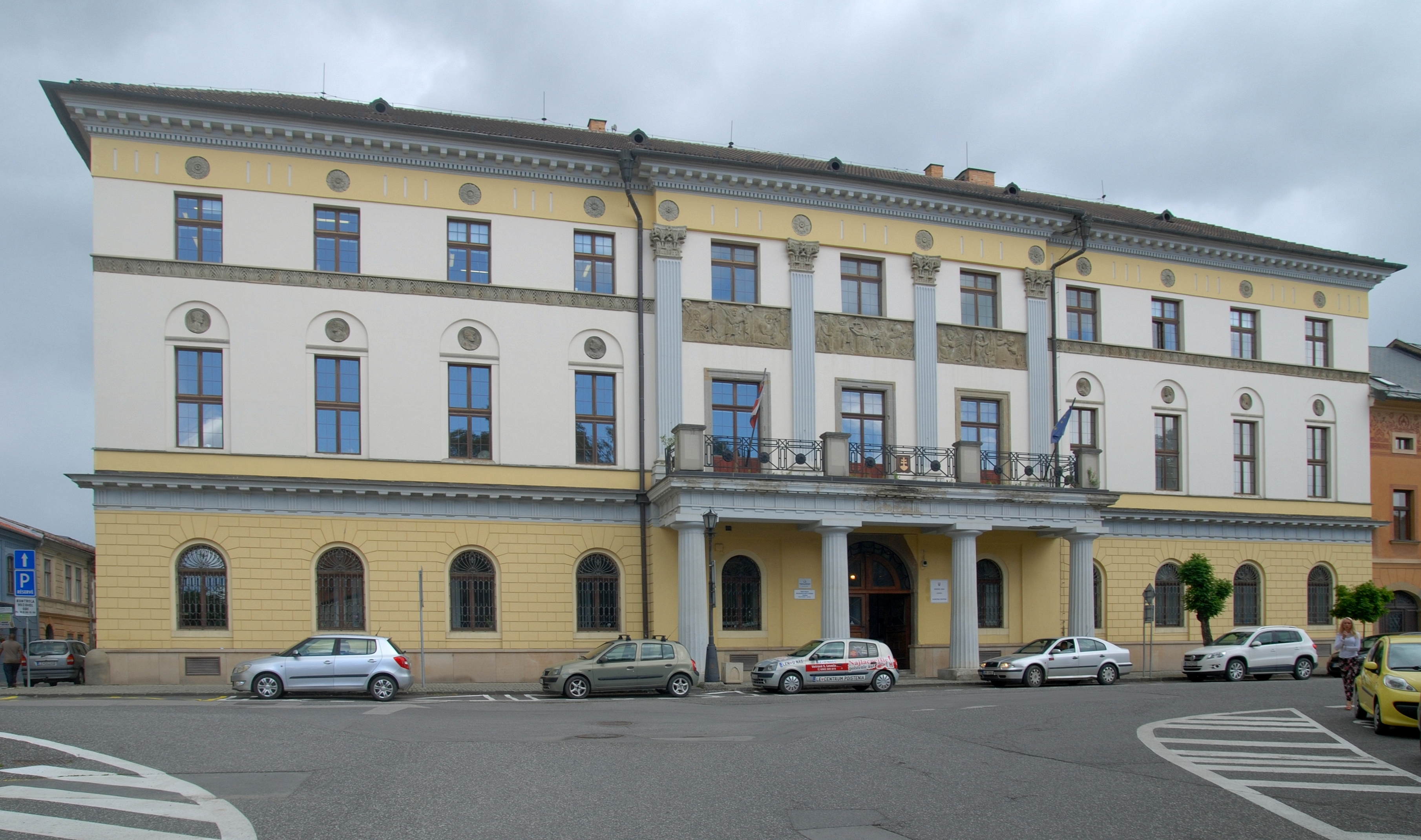 miasto Levoča